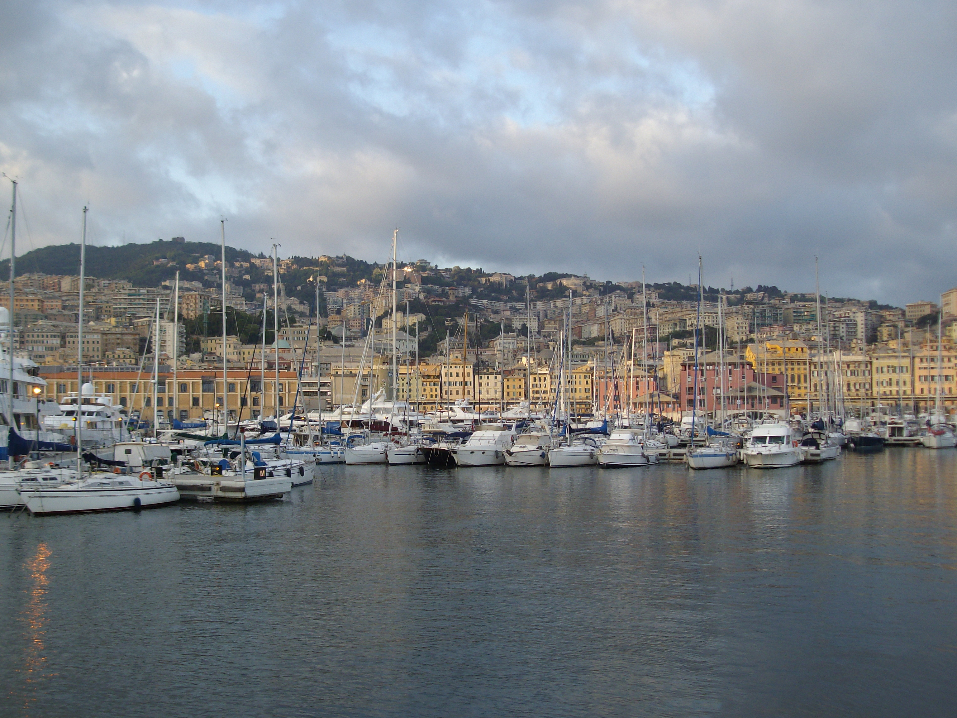 Yachts nel porto di Genova